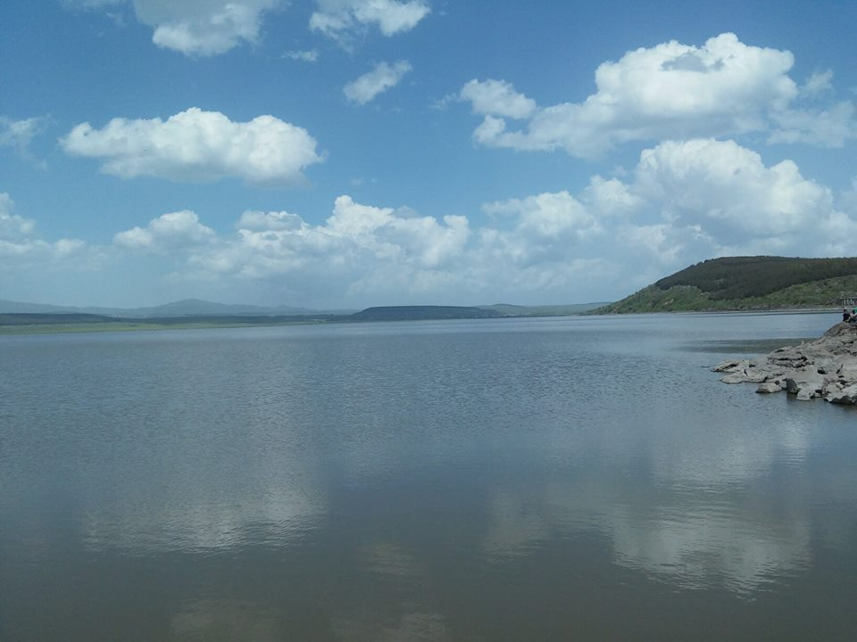 წალკის წყალსაცავი